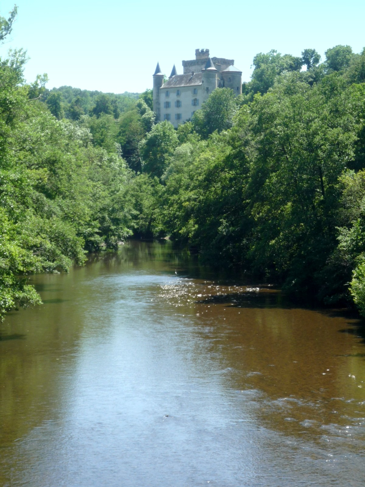 La rivière Alagnon à Torsiac (Haute-Loire) France